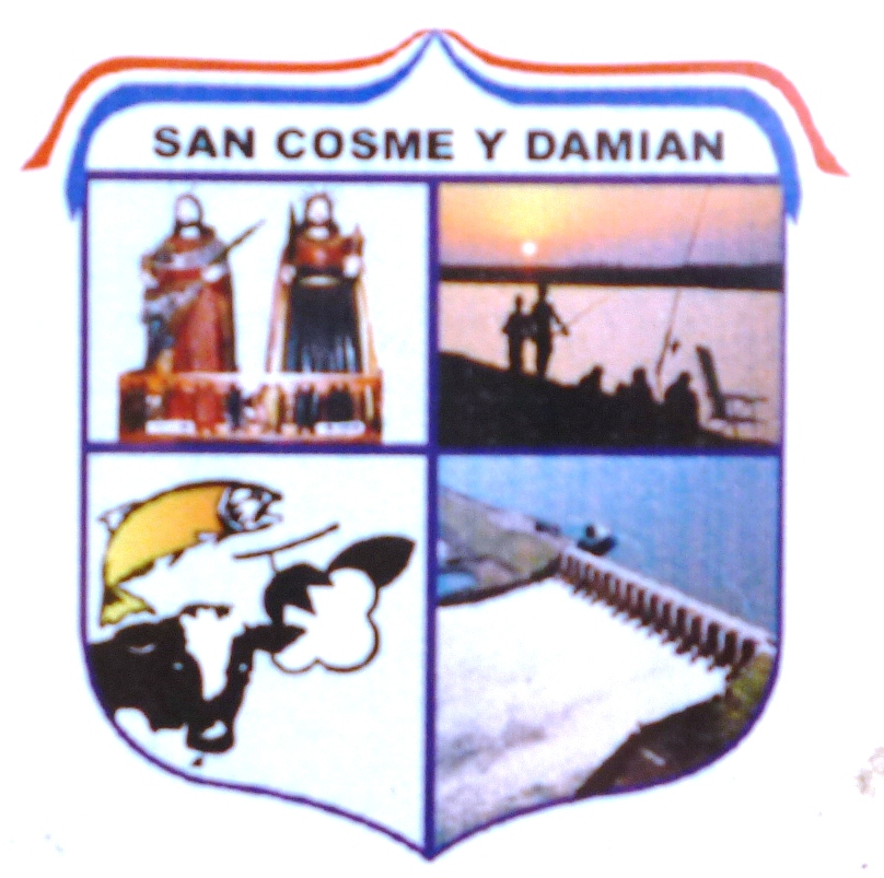 Escudo de San Cosme y Damian, Itapúa, Paraguay